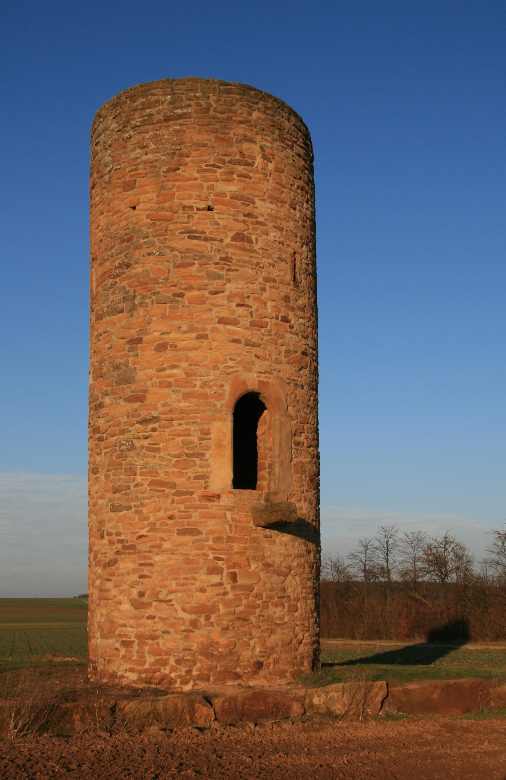 Wartturm "Weißer Turm" in Wülfershausen an der Saale in der winterlichen Abendsonne